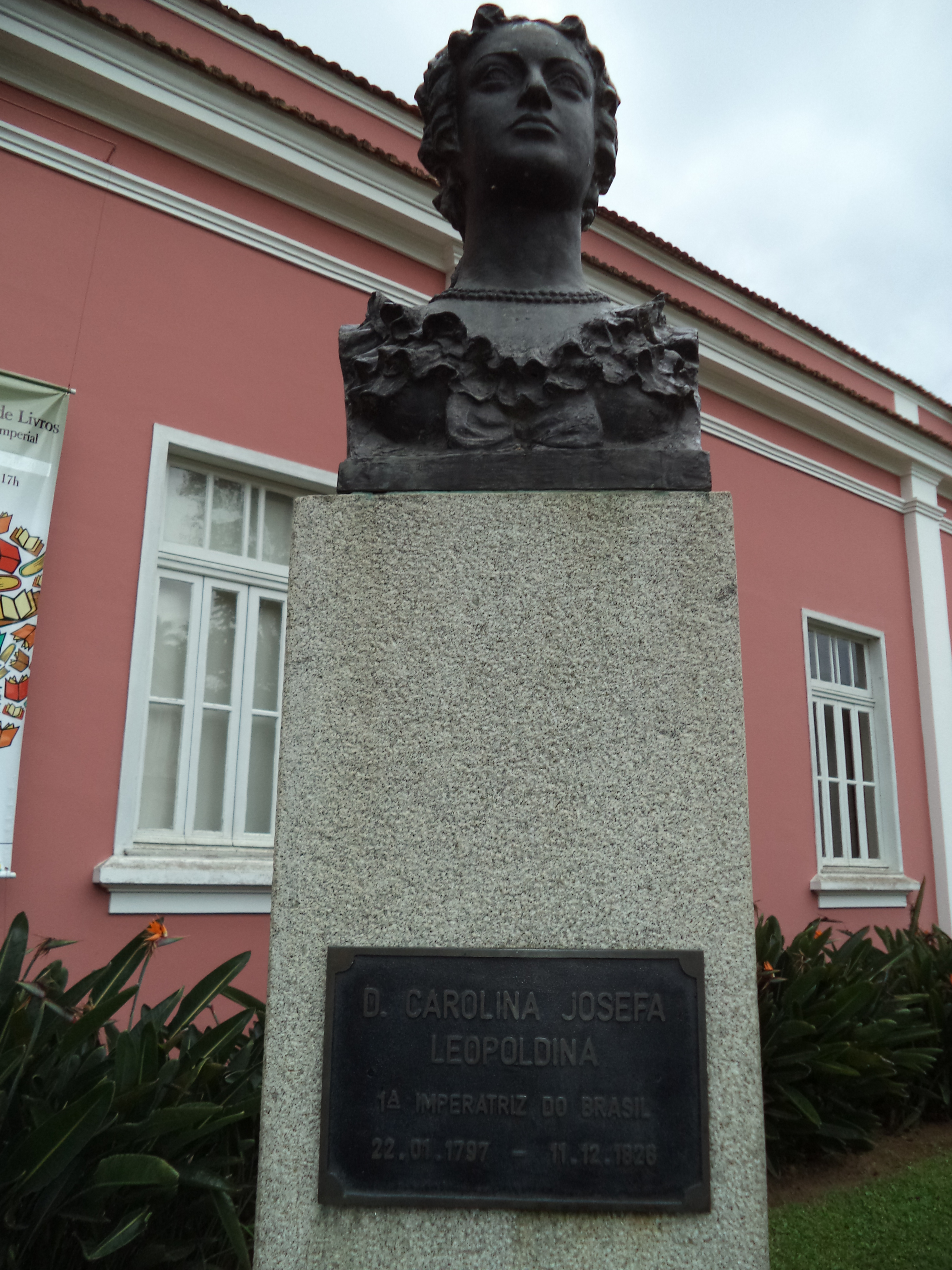 Estátua de Carolina Josefa Leopoldina, no Museu Imperial, em Petrópolis.